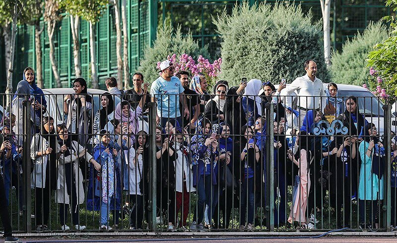 استقلال - زنان - بانوان - هوادار - تعصب